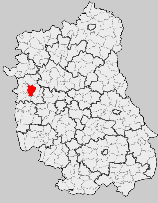 Map of gmina Końskowola, Puławy county, Lublin voivodship Mapa gminy Końskowola, powiat puławski, województwo lubelskie